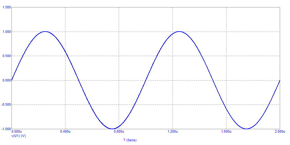 Siniaallon kuvaaja, jännite ajan funktiona